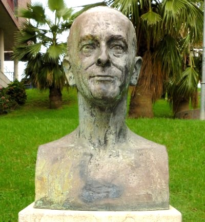 Andolin Eguzkitza hizkuntzalariaren bustoa Santurtzin izen bereko parkean.